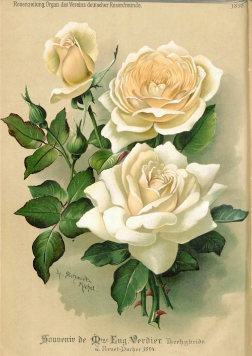 'Souvenir de Madame Eugène Verdier', rose hybride de thé obtenue par Pernet-Ducher. Illustration dans Rosen-Zeitung de Lina Schmidt-Michel.